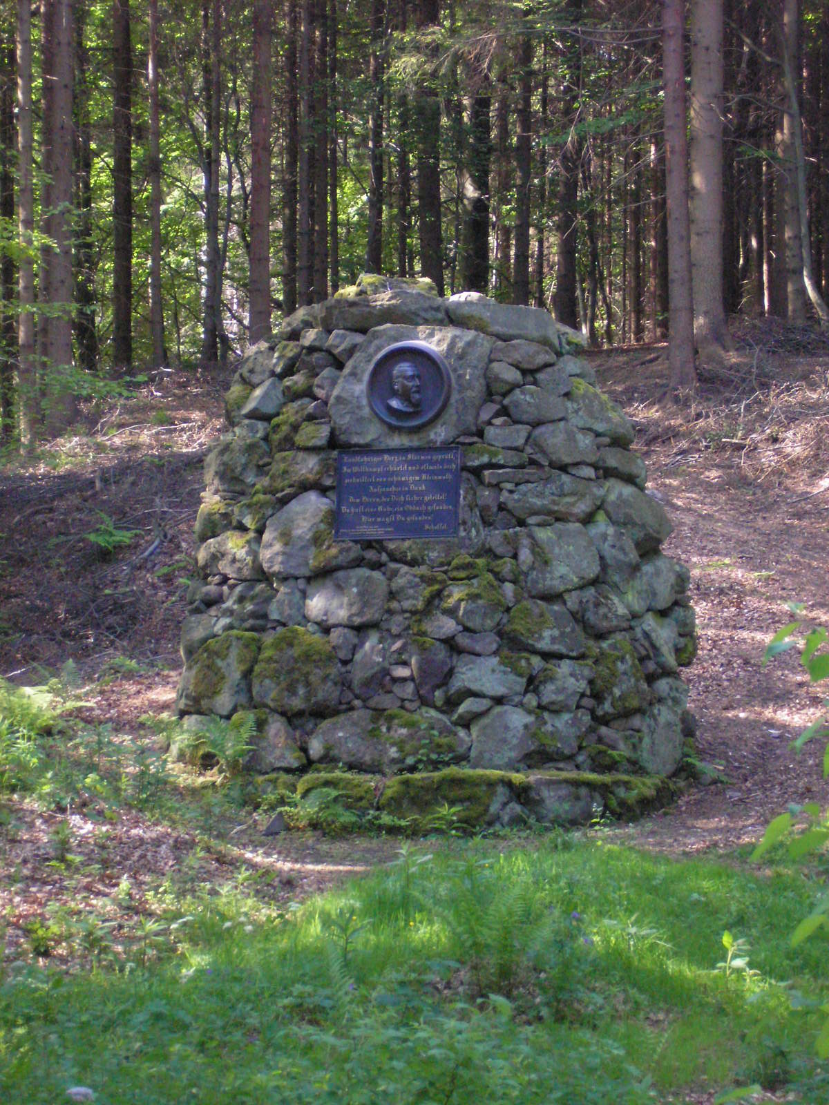 Das Scheffeldenkmal im Gabelbachtal bei Ilmenau (Thüringen).